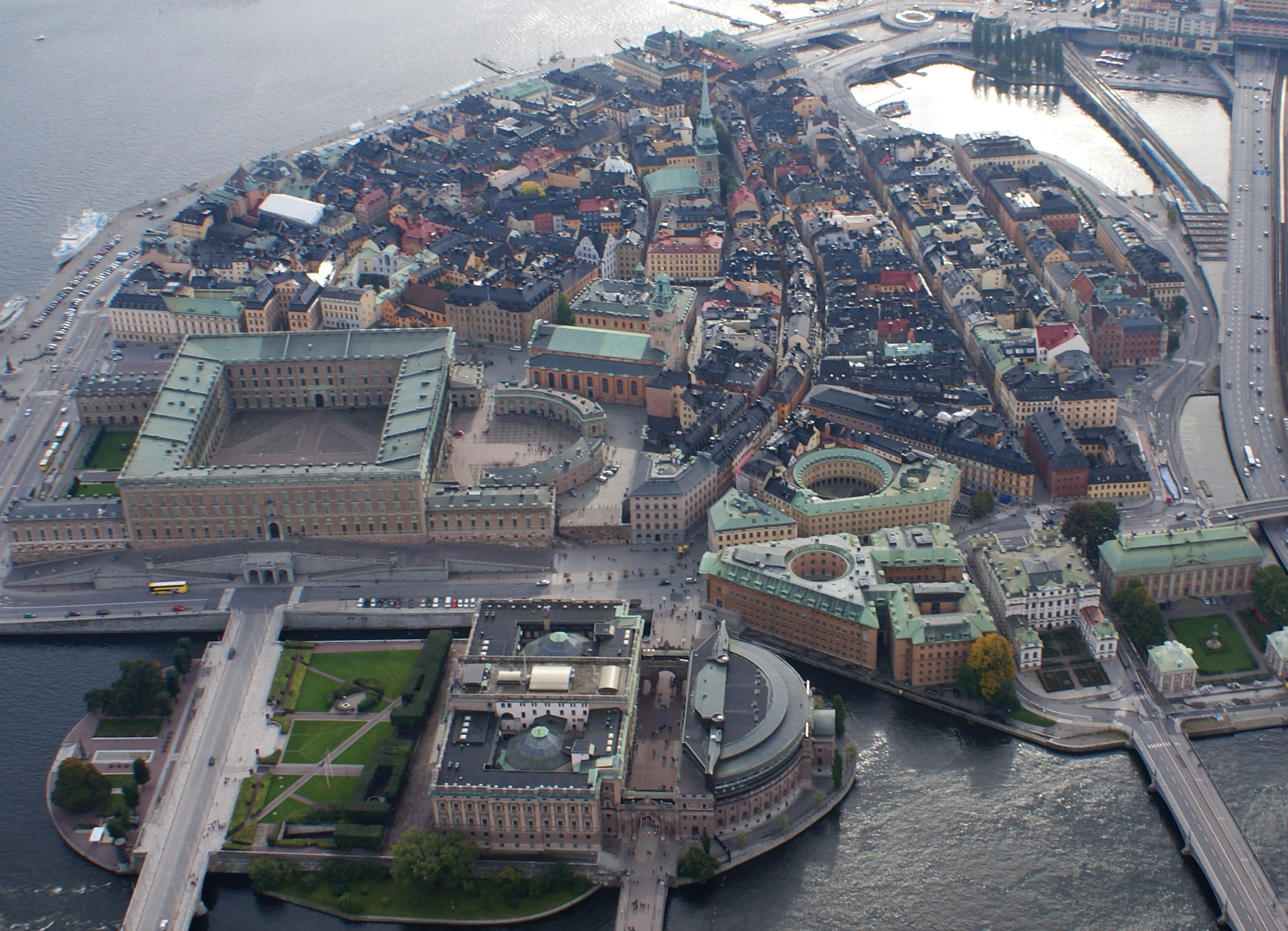 sedd från helikopter.